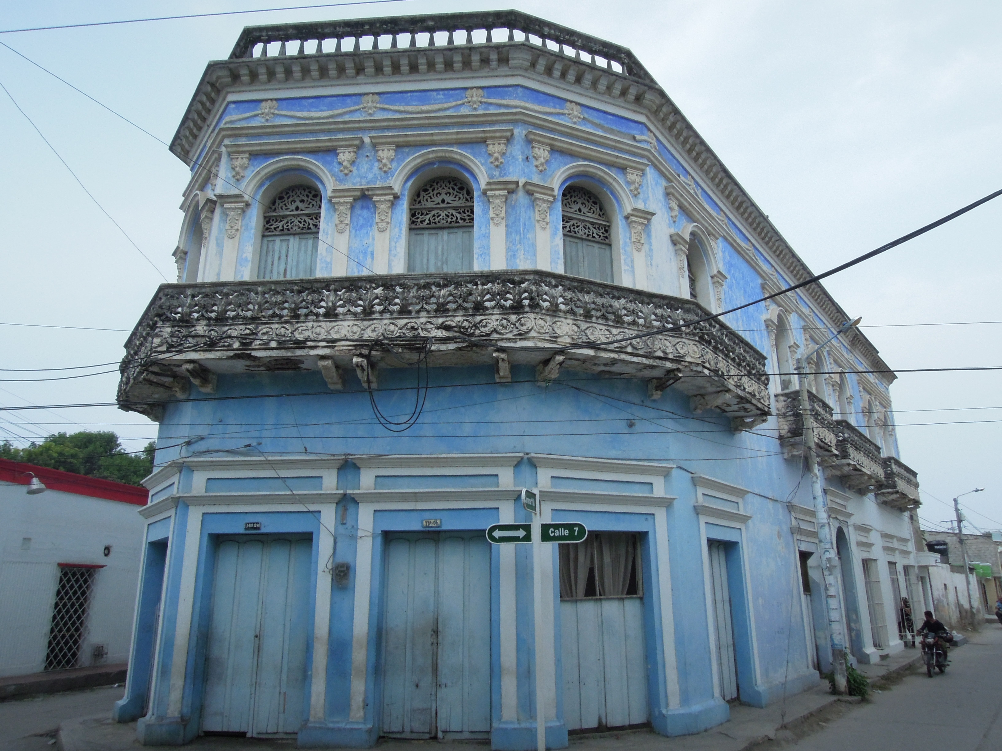 Casa Azul de Cienaga Magdalena Colombia Estilo Republicano